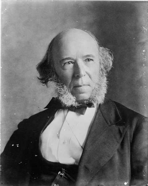 Herbert Spenser